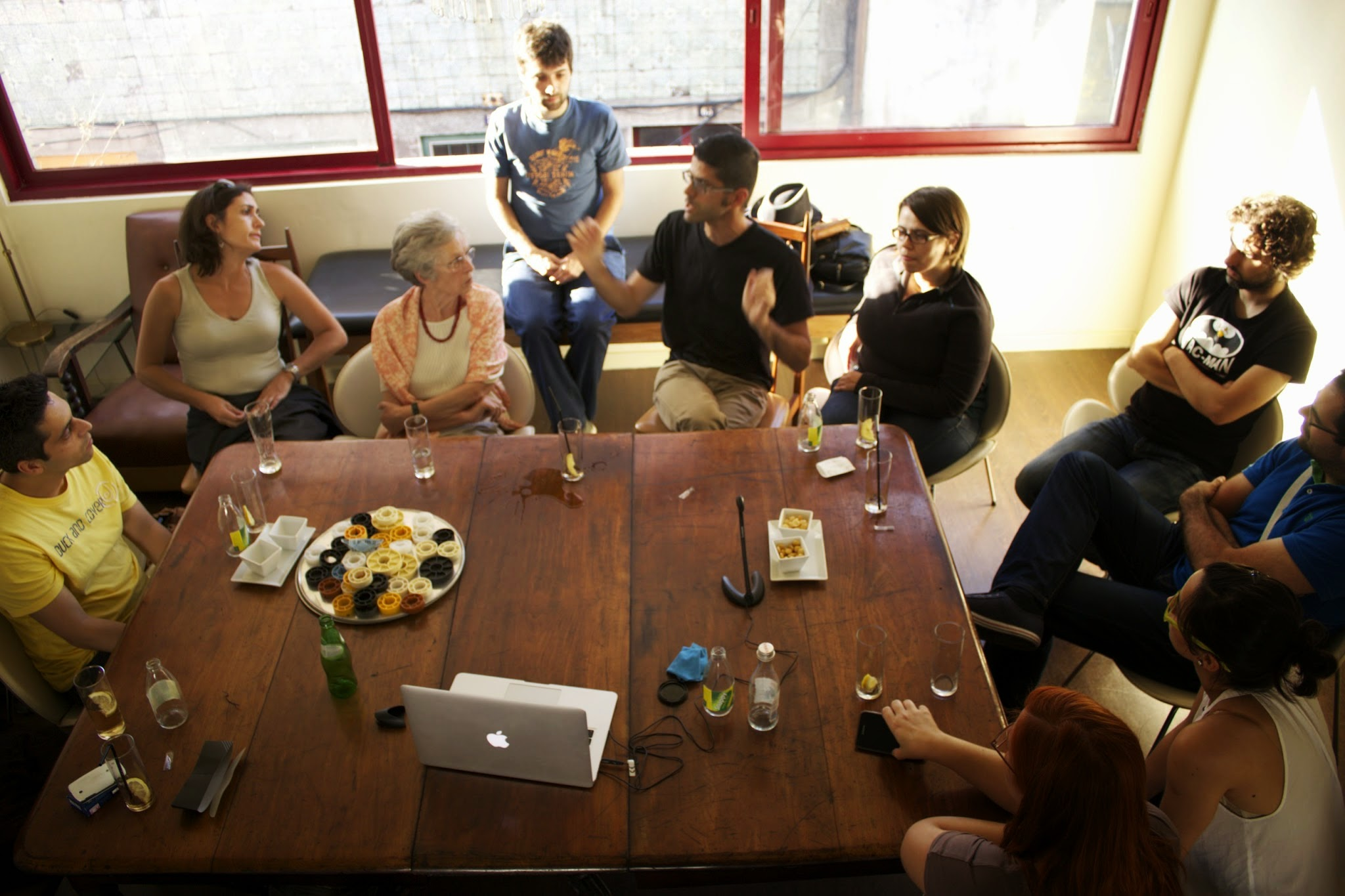 Cépticos com Vox - Tertúlia sobre a matemática e os detectores de mentiras – a lógica informal e as falácias do dia-a-dia. A 20 de Julho no bar "O Canhoto", no Porto.